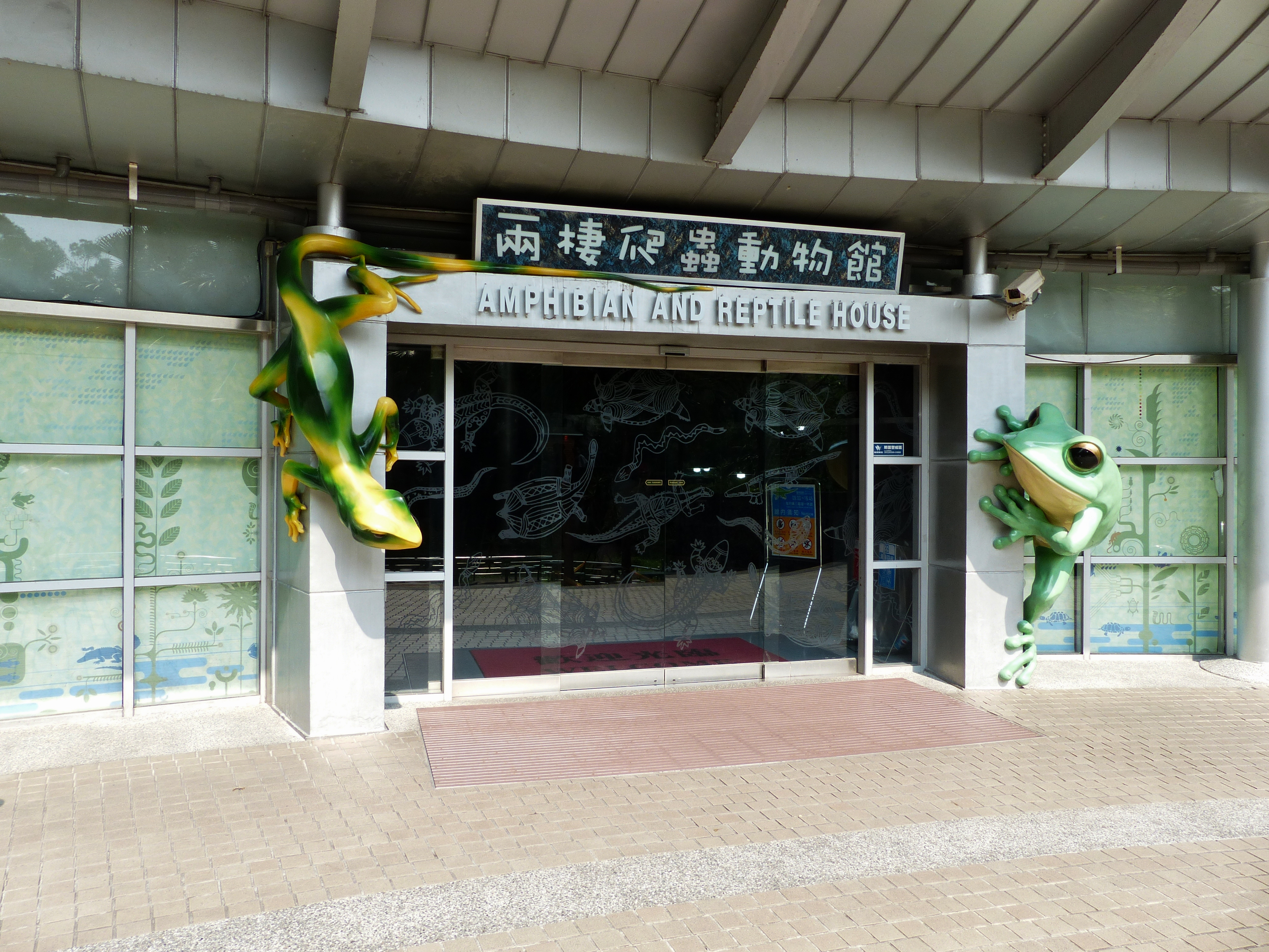 臺北市立動物園兩棲爬蟲動物館入口。